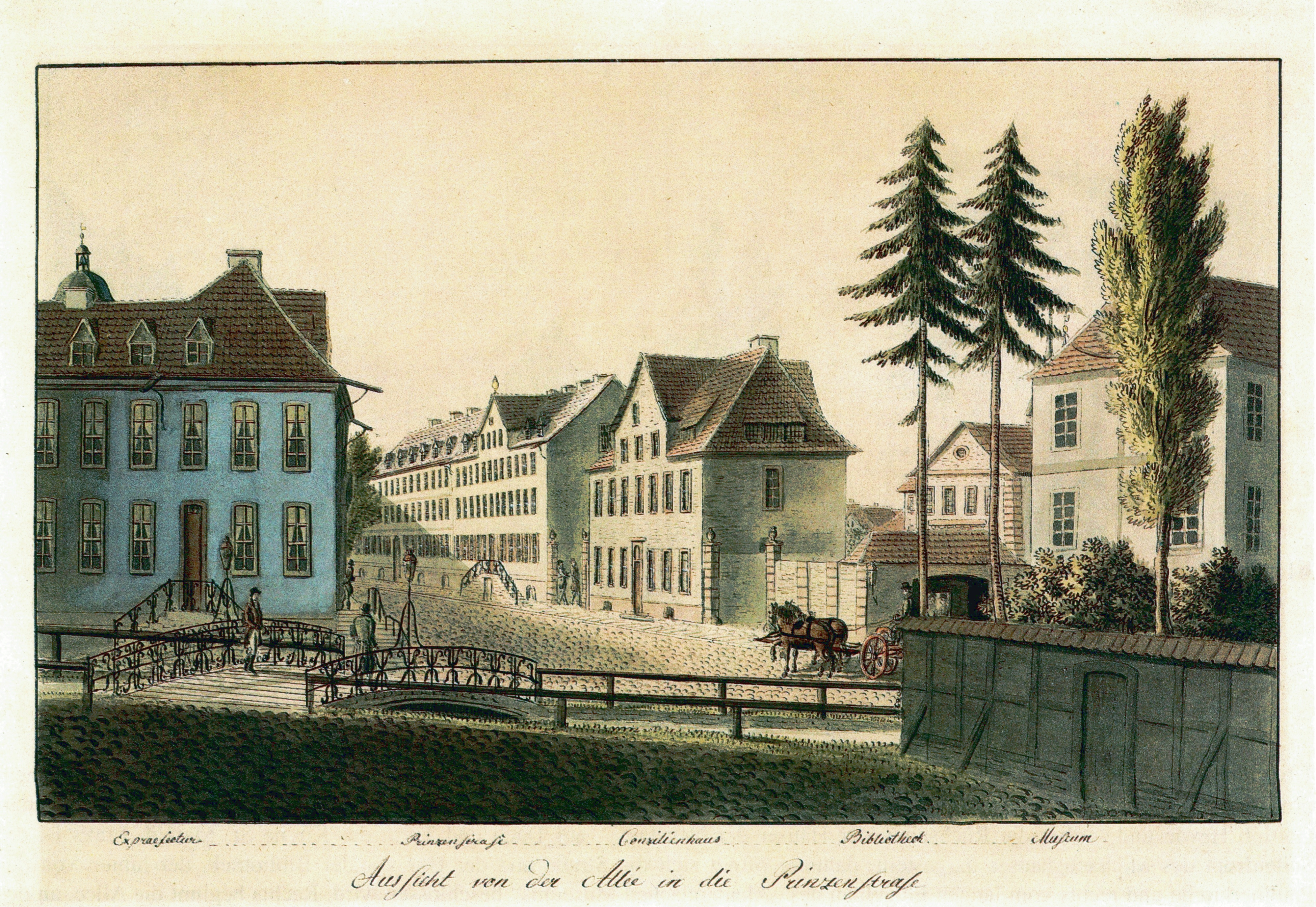 Aussicht von der Allée in die Prinzenstrase. Von der heutigen Goetheallee aus nach Osten geblickt, vorne der Leinekanal, links dahinter das Michaelishaus, hier als Expraefectur bezeichnet, da es im Königreich Westfalen bis 1813 als Sitz der Präfektur des Leine-Départements diente. An der Prinzenstraße mit hochgelegenem Eingang das Prinzenhaus, rechts daneben zwischen den Durchgängen zum Hof der Universität das Konzilienhaus, an dessen Stelle 1878–82 die dritte Erweiterung der Universitätsbibliothek errichtet wurde. Aquarellierte Federzeichnung